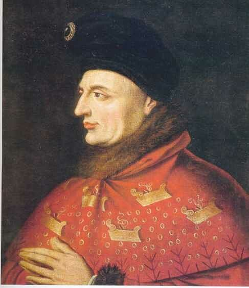 Jean sans peur (1371 - 1419).